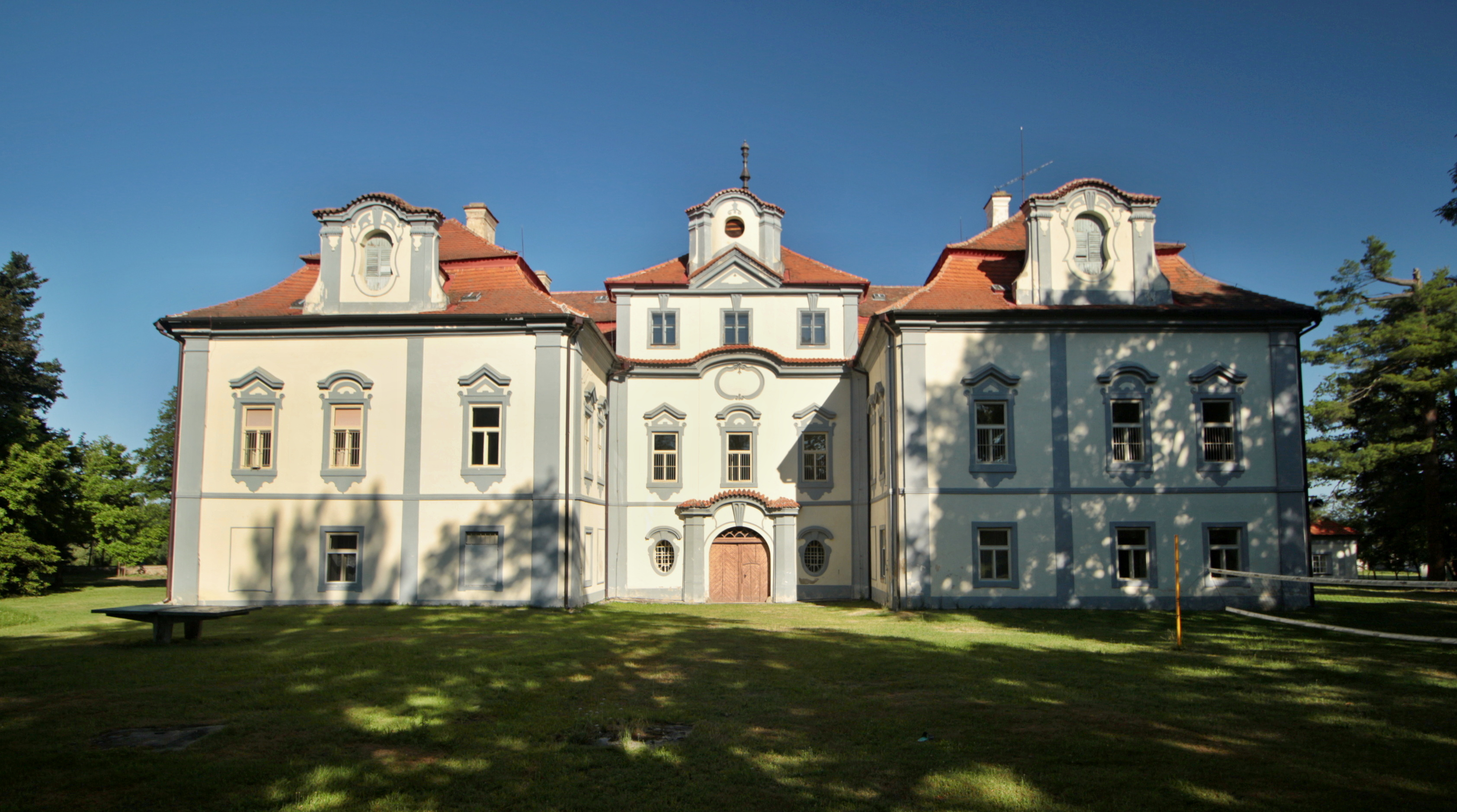 Přestavlky